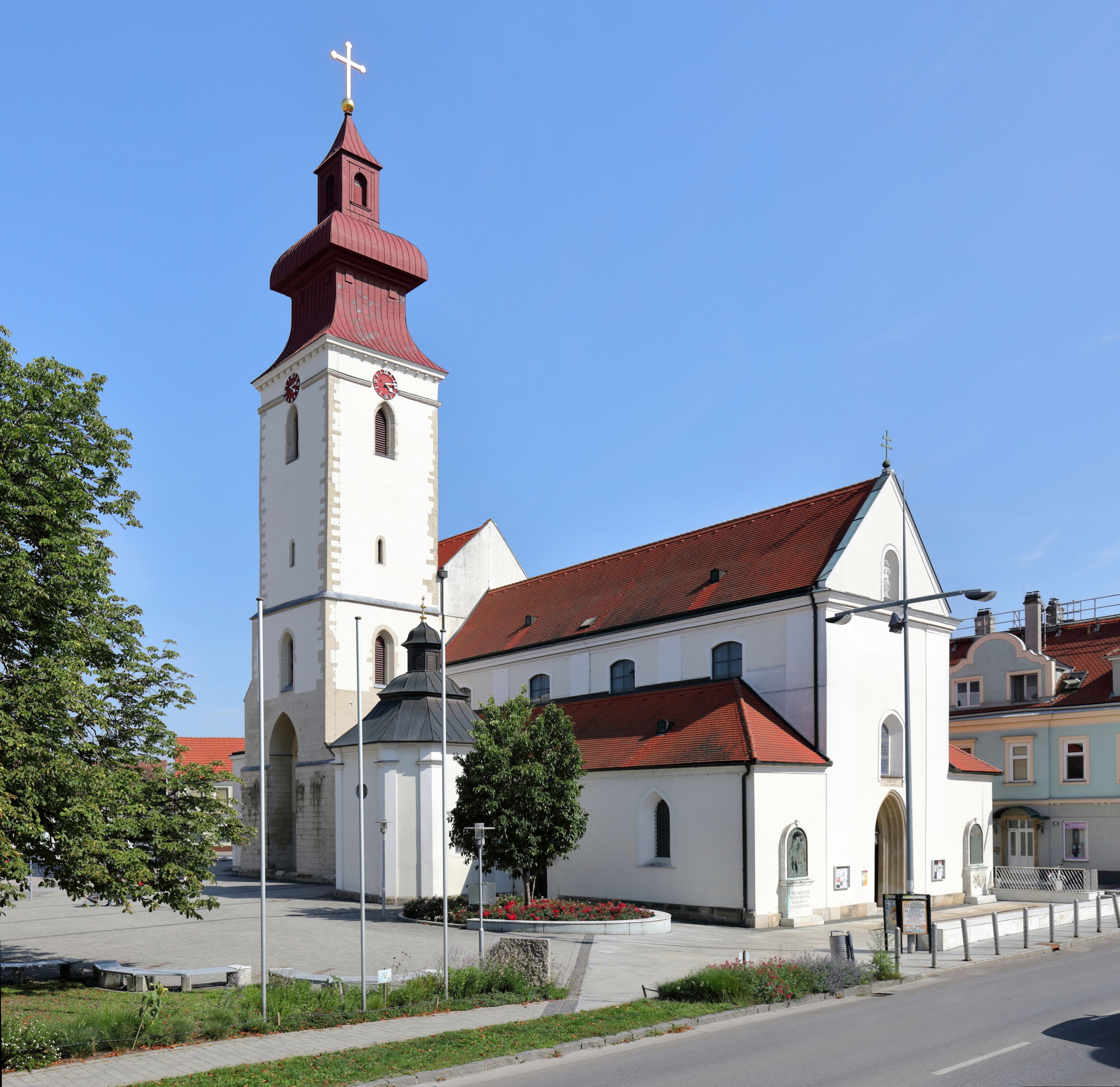 Nordwestansicht der röm.-kath. Pfarrkirche Maria Schutz in der niederösterreichischen Stadtgemeinde Groß-Enzersdorf. Eine ehemalige Wehrkirche mit wuchtigem Nordturm, die in der 2. Hälfte des 17. Jahrhunderts brockisiert wurde. Das Langhaus wurde Ende des 13. Jahrhunderts errichtet und der erhöhte Chor Ende des 14. Jahrhunderts. Die Sakristei und der Kapellenanbau wurden in der Barockzeit errichtet.